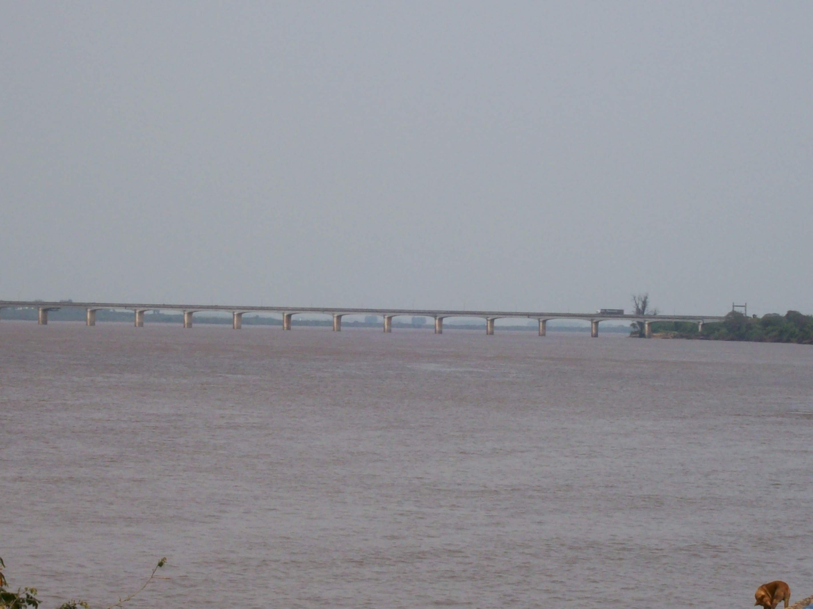 Sección argentina del puente internacional sobre el Río Uruguay que une Paso de los Libres, Corrientes, Argentina con Uruguayana, Rio Grande do Sul, Brasil. Vista desde la costa de Paso de los Libres.